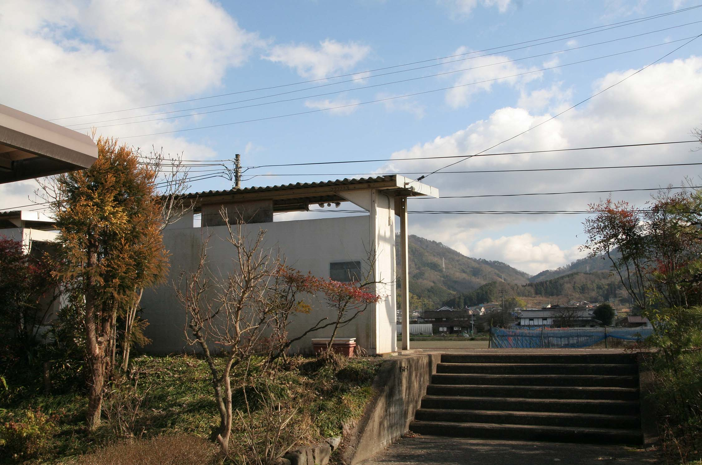 古見駅の駅舎